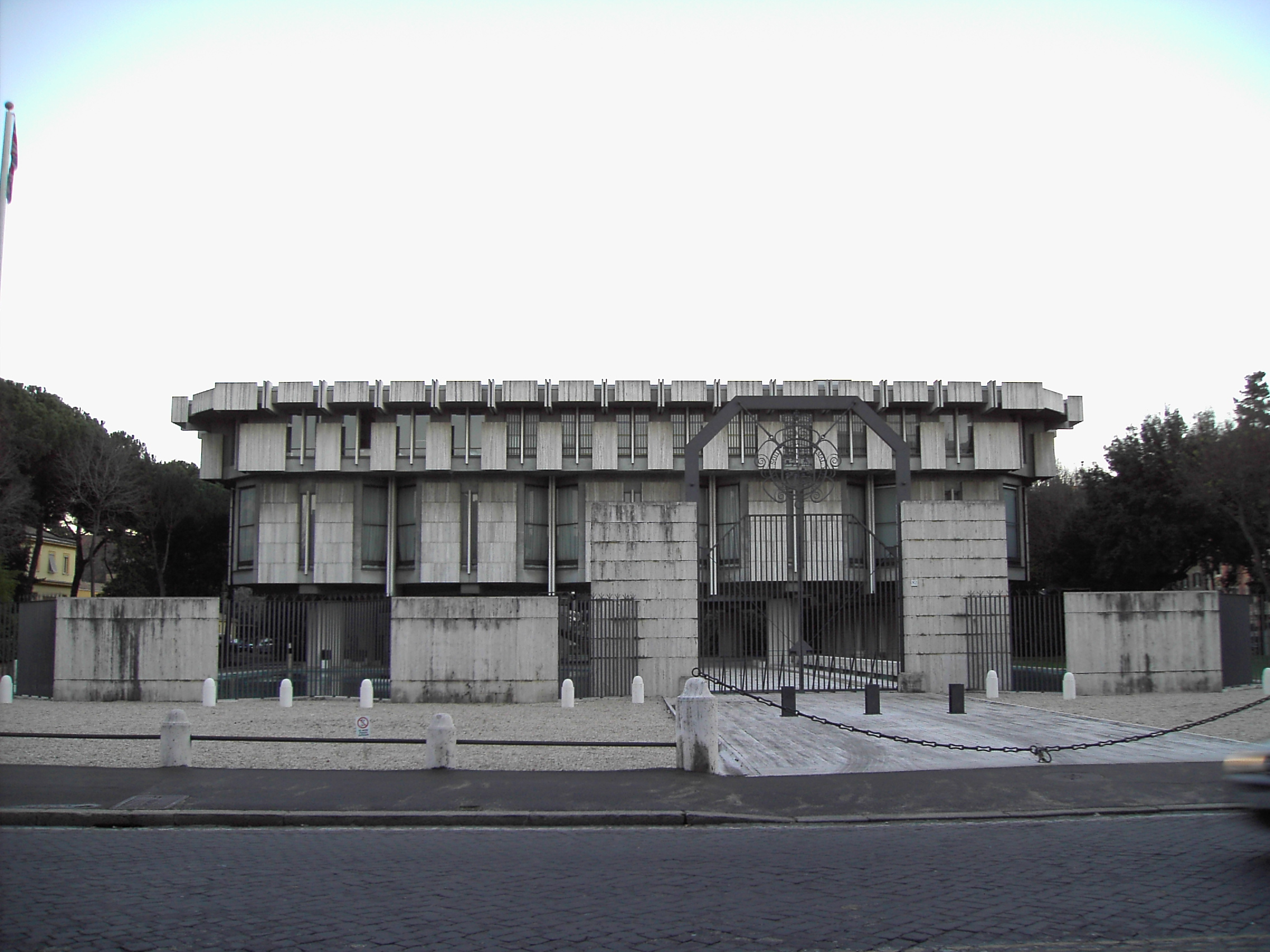 Roma, Porta Pia. Ambasciata britannica presso la Santa Sede e presso la Repubblica Italiana (Basil Spence 1971)